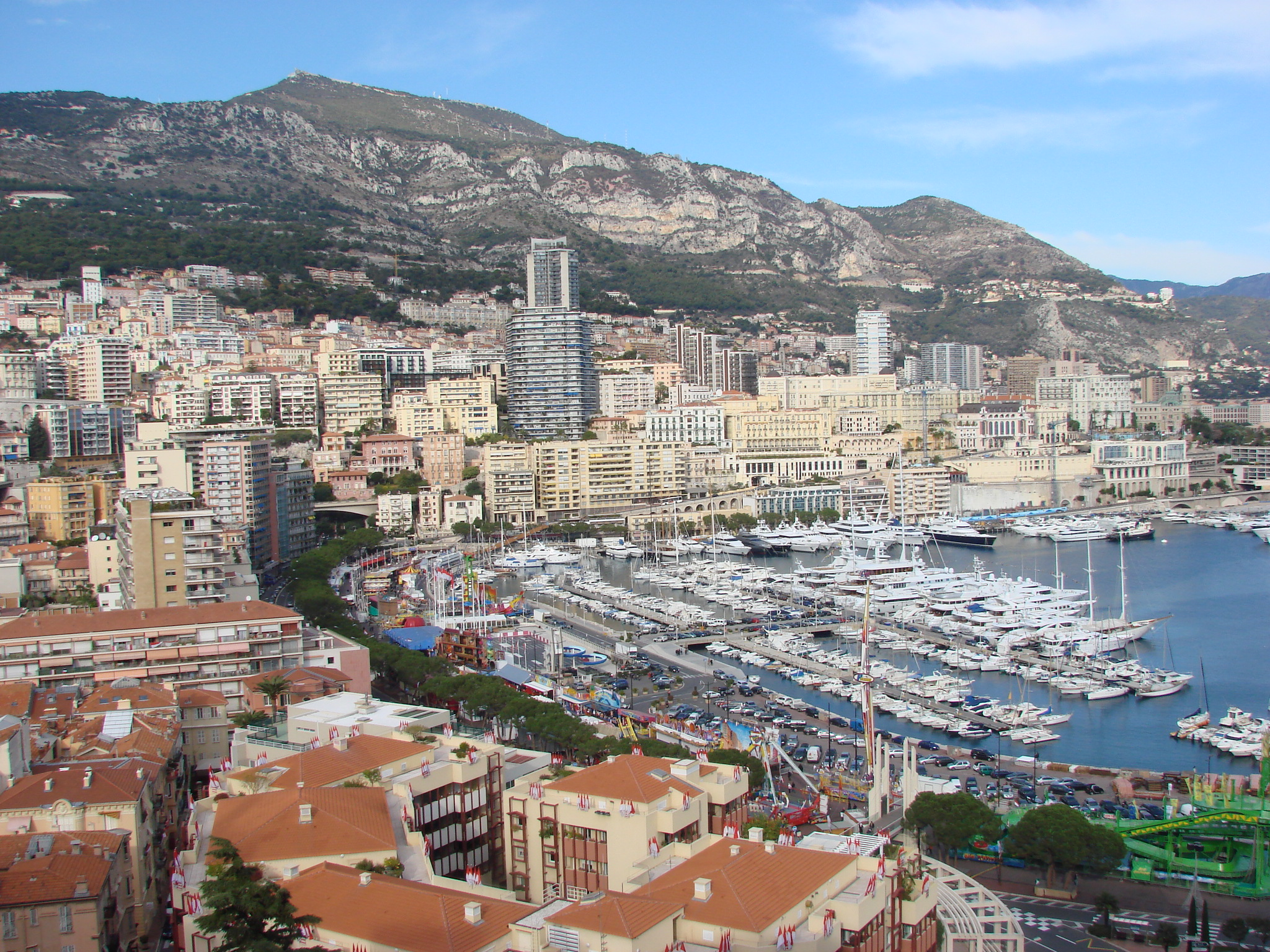 Monaco